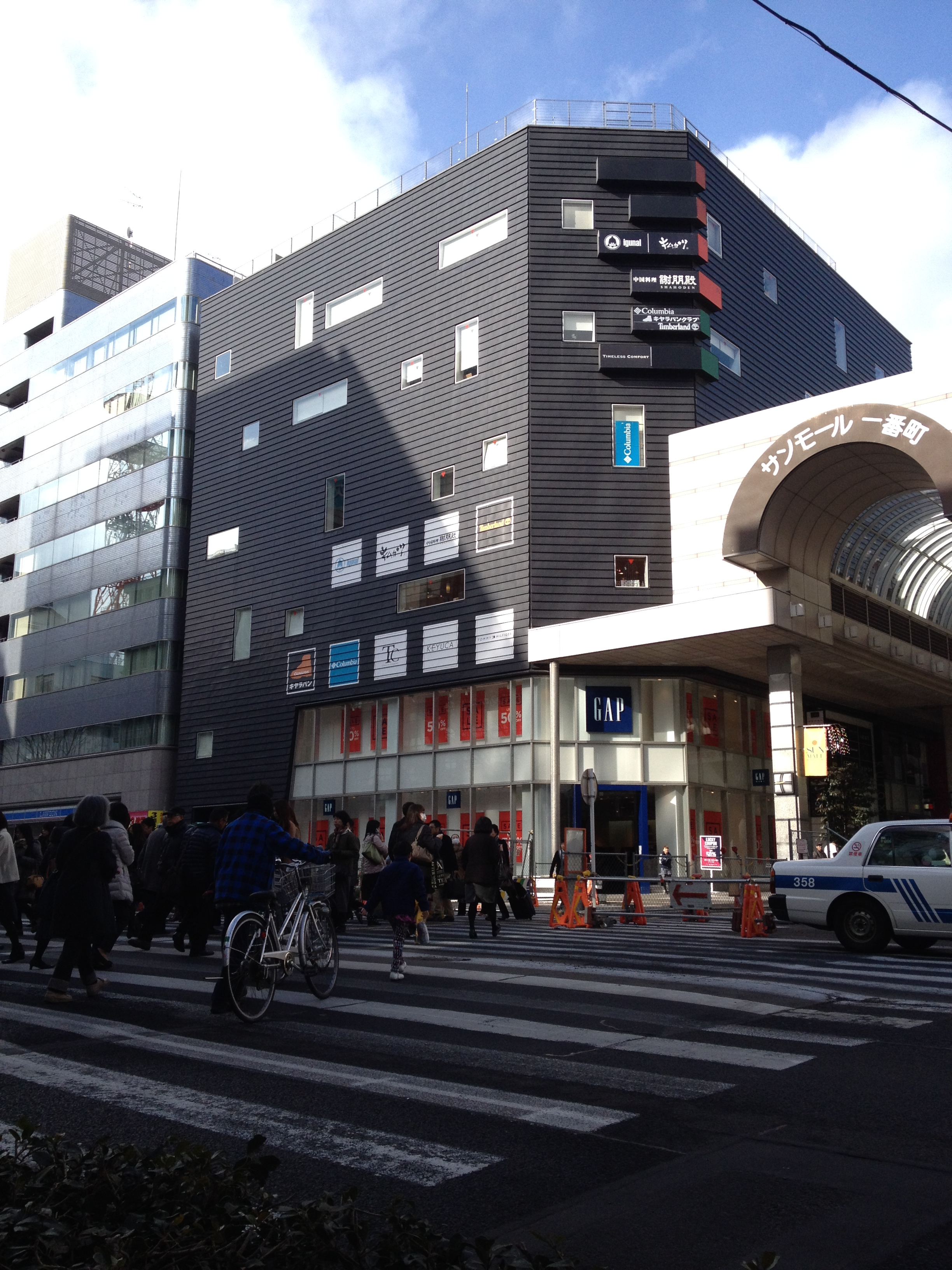 クラックス（仙台市青葉区）